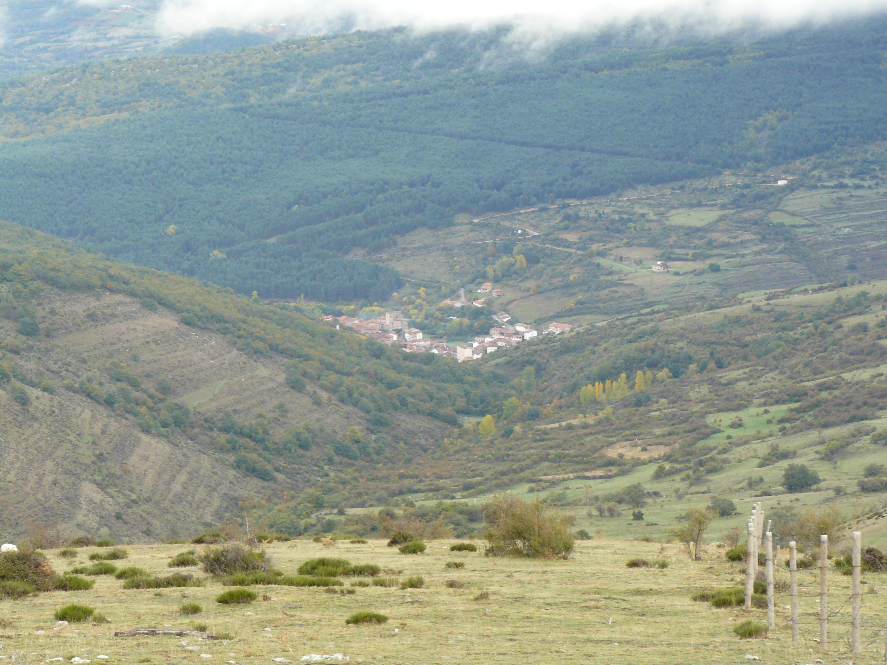 Villoslada de Cameros desde el GR-190.